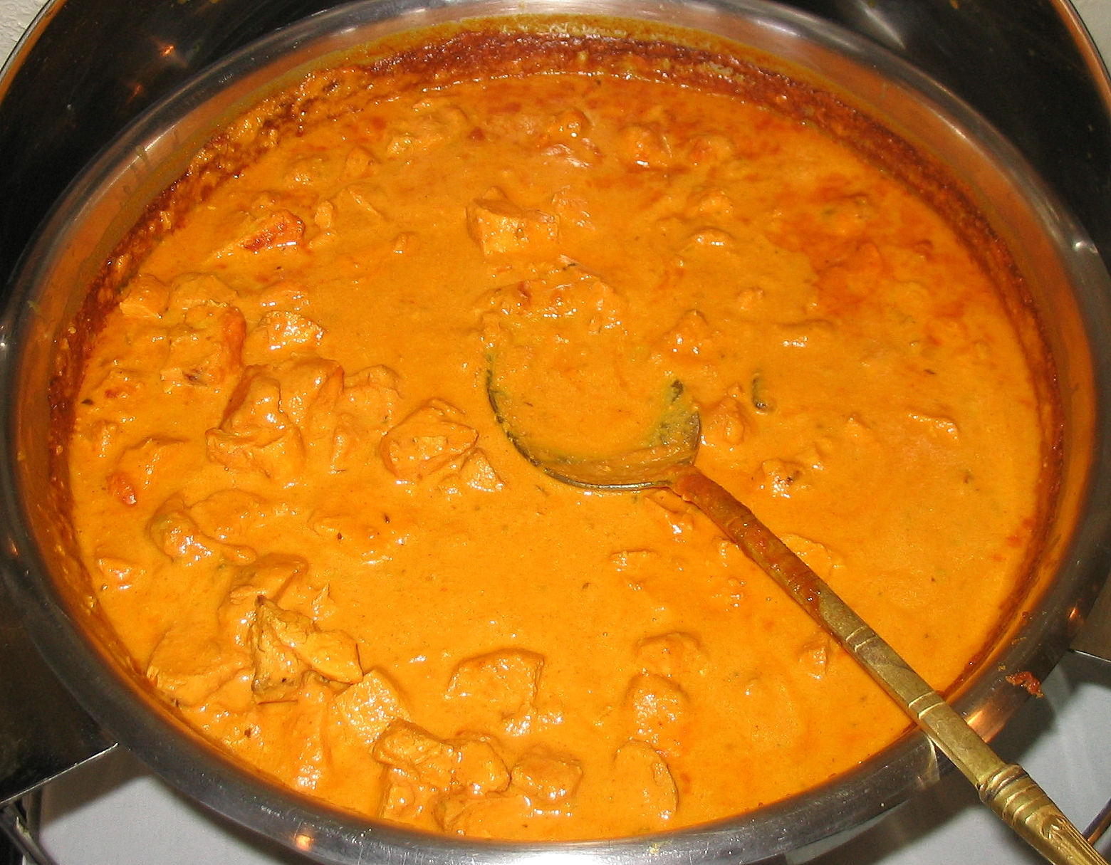 Chicken tikka masala, an Indian dish.